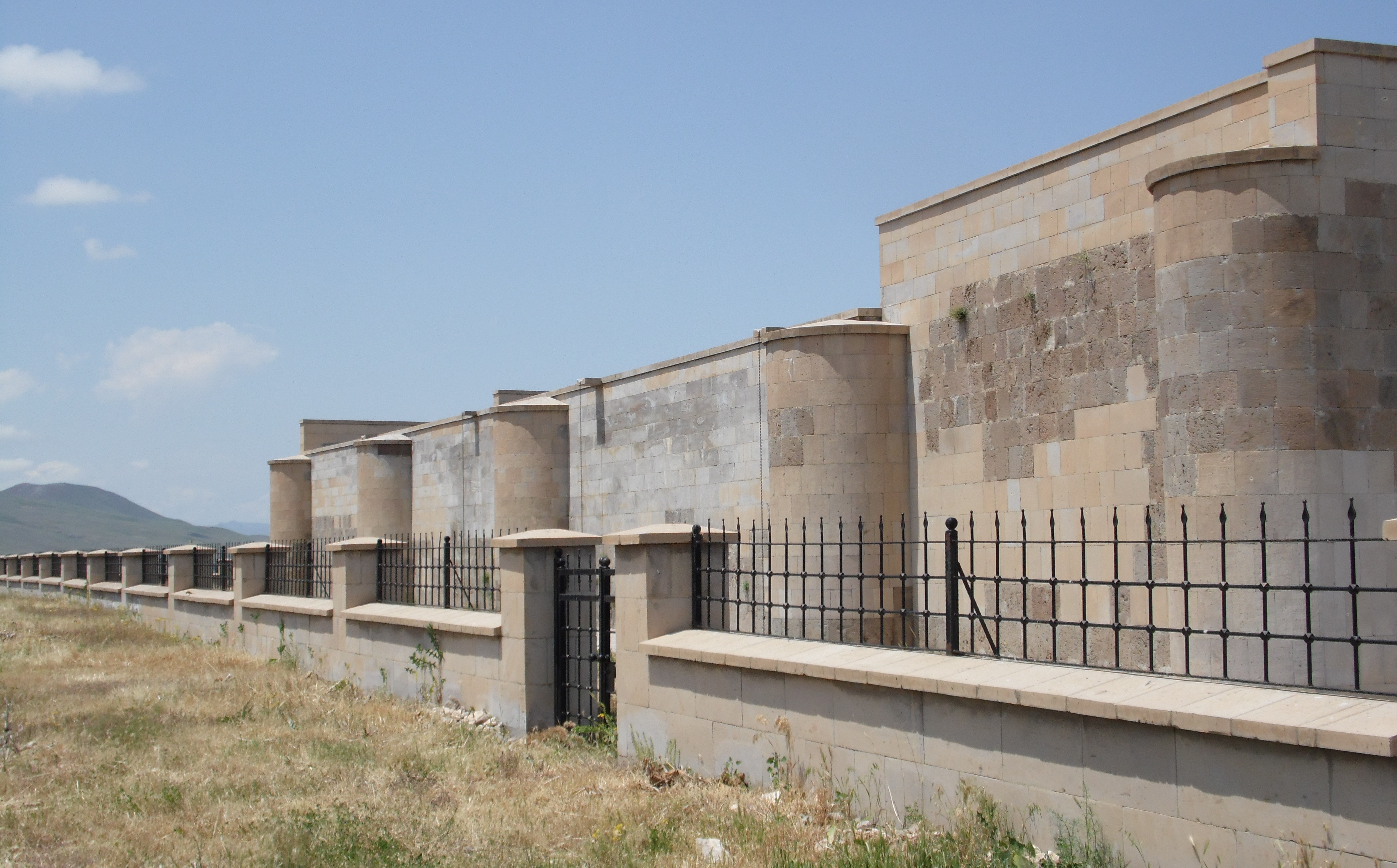 ığdır kervansaray